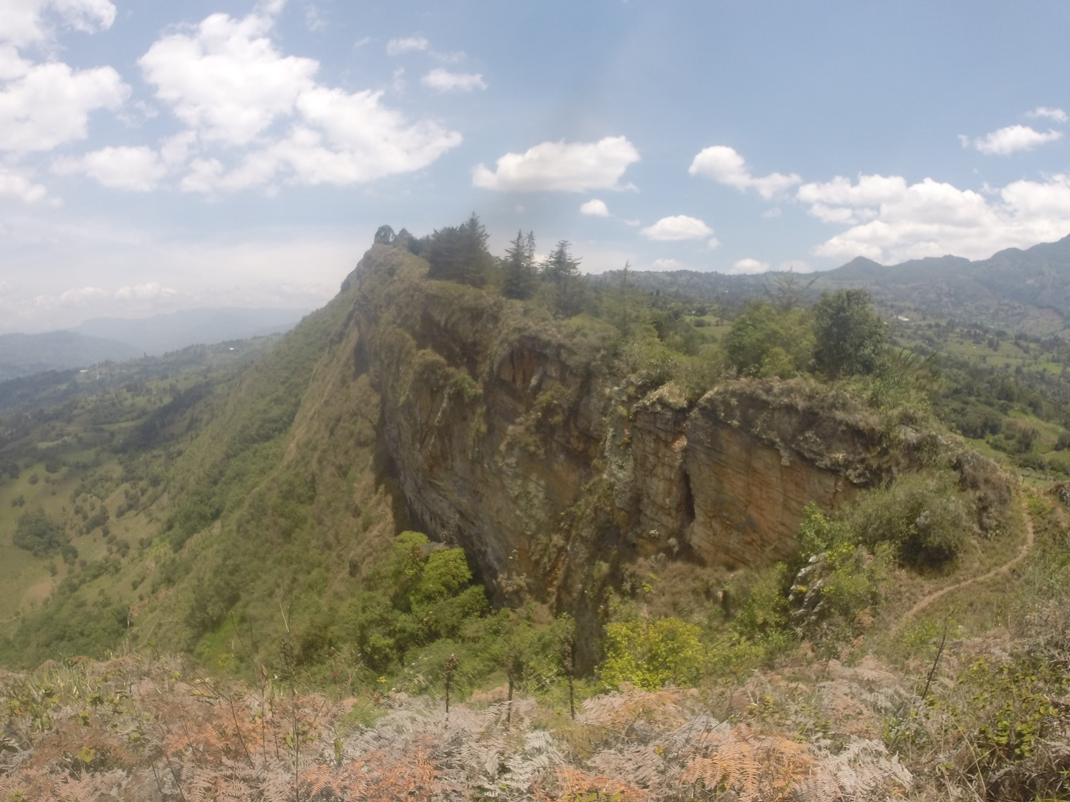 Esta fotografía fue tomada en el municipio colombiano con código 15511.